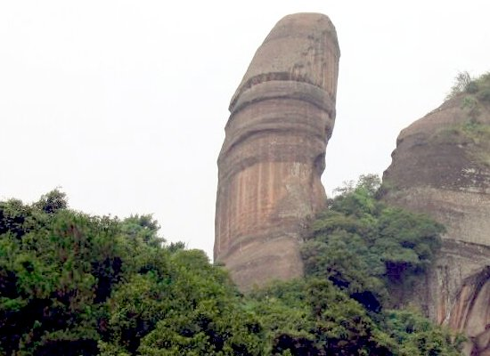 内容介绍：丹霞山阳元石 原创者：zhuwq 创作日期：2004年1月，过年回家去丹霞山玩时用数码相机所摄